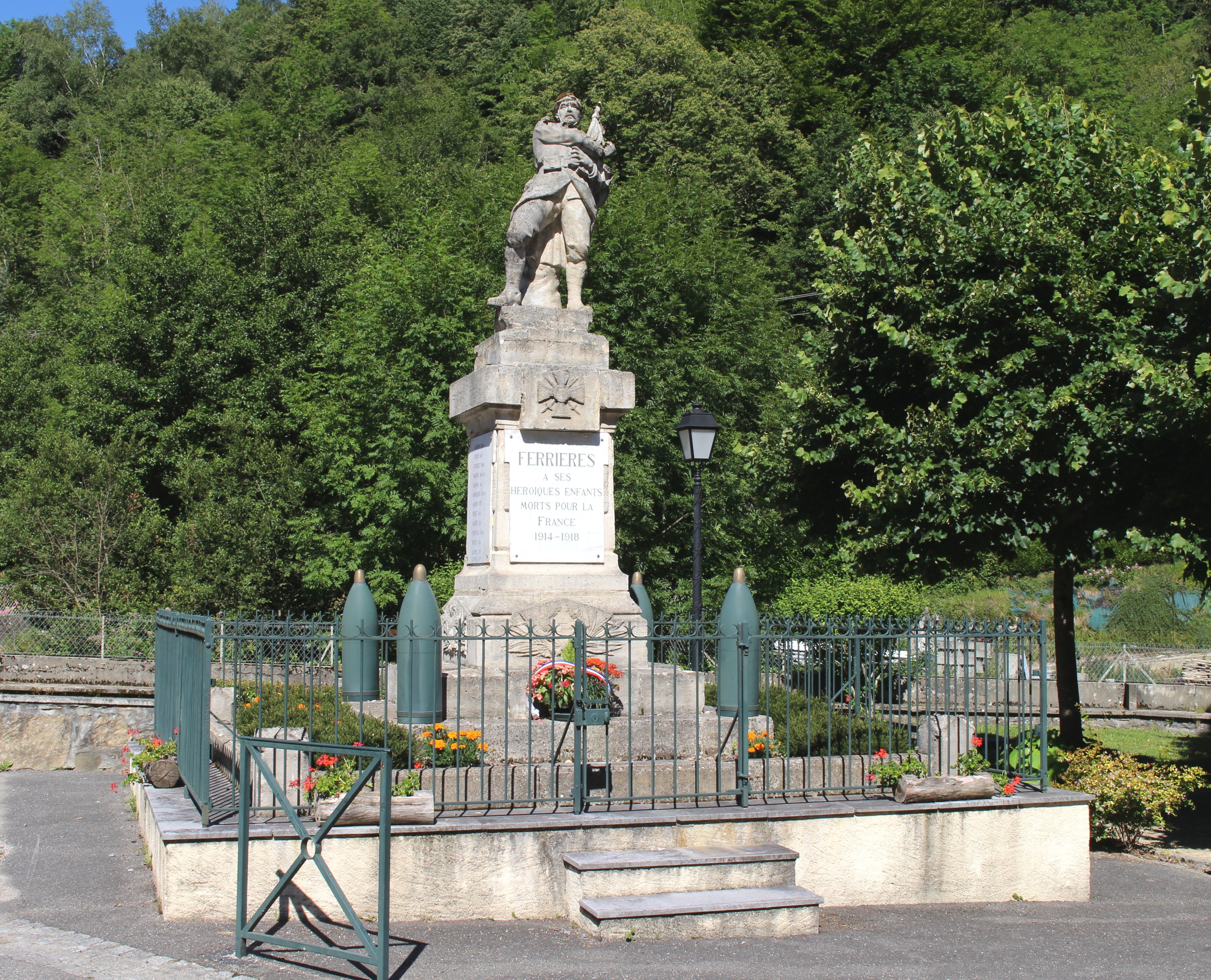 Monument aux morts de Ferrières (Hautes-Pyrénées)